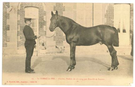 L'étalon trotteur Anglo-normand Fuschia (1883 - 1908) présenté en main.